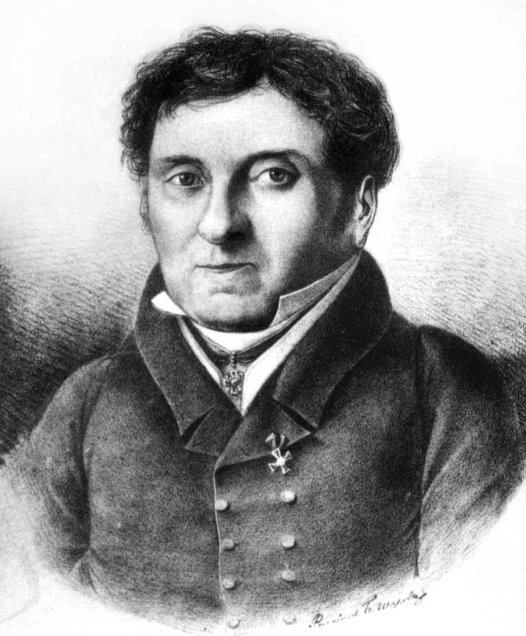 Двигубский Иван Алексеевич (1771—1839) - естествоиспытатель, ректор Московского университета.